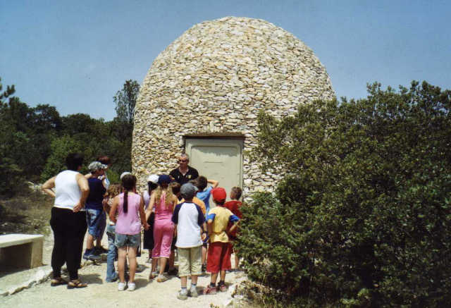 planetarium - Parc du Soleil et du Cosmos - Les Angles (Gard)